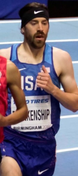 WK040129 finale 1500m